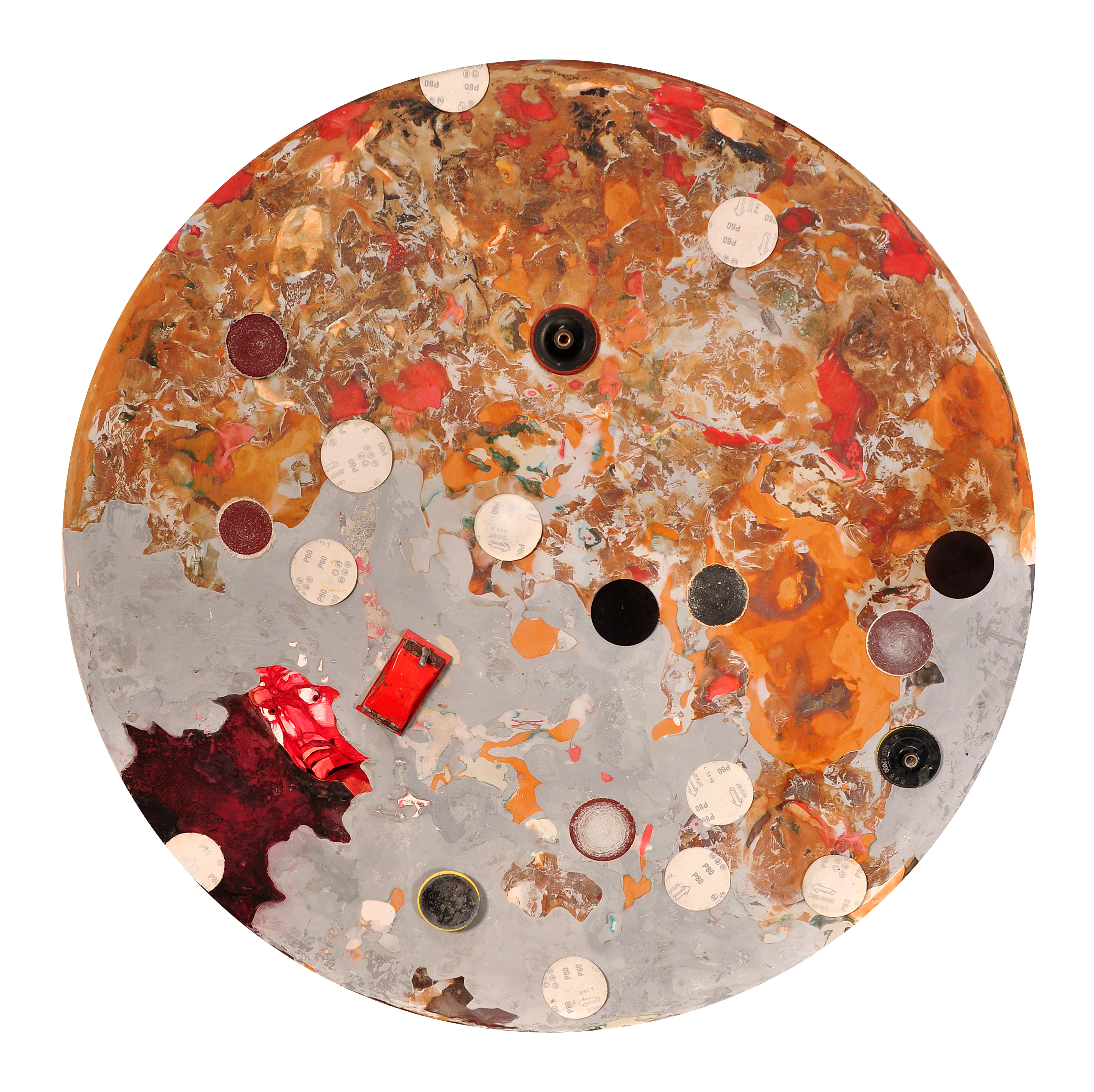 සිංහල: සුජිත් රත්නායක, මනෝභ්‍රාන්ති IV, 2017, මිශ්‍ර මාධ්‍යය